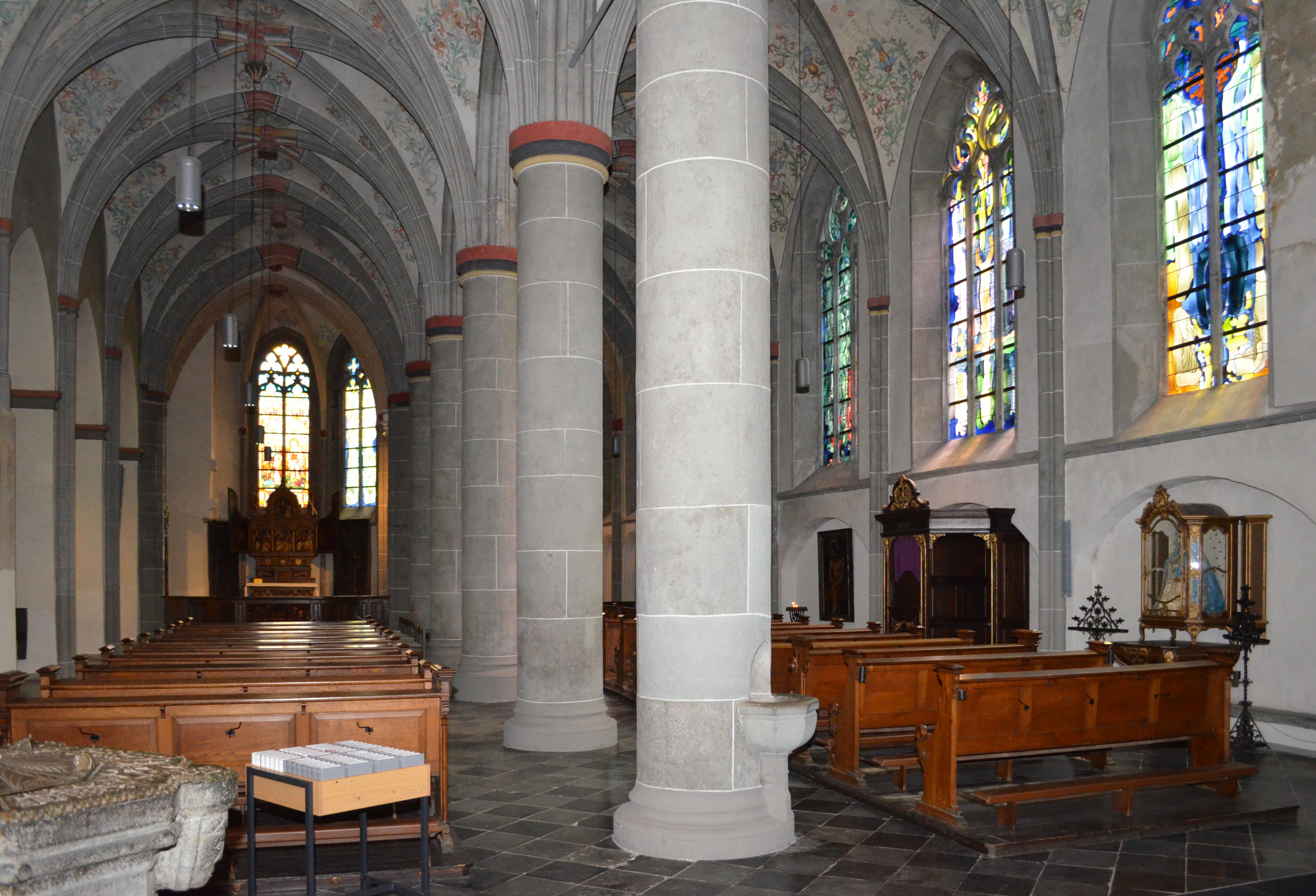 Die Südschiffe der Kirche St. Kornelius in Kornelimünster